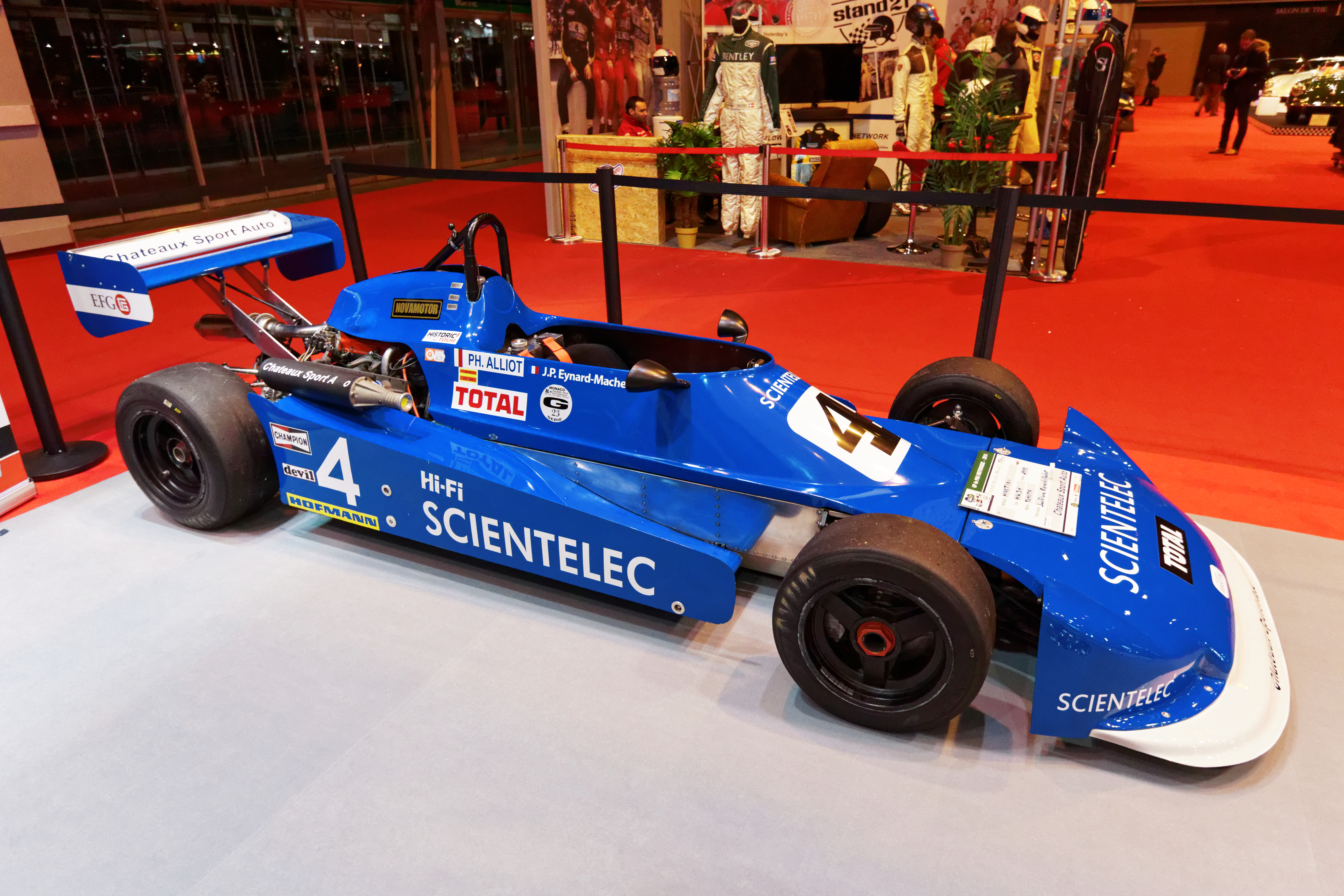 Une des voiture présentée lors du salon Rétromobile de Paris 2015